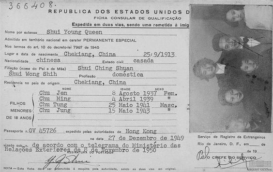 Fundo: Divisão de Polícia Marítima, Aérea e de Fronteiras.